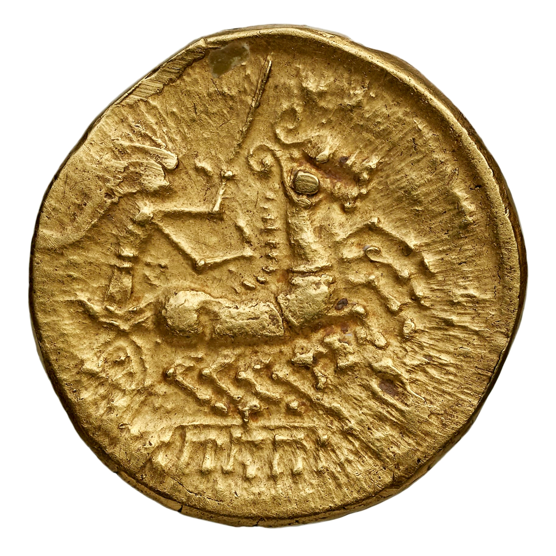 Demi-statère des Ambianis. Revers : Aurige conduisant un bige. Or, 4,08 gr. Diamètre environ 16 mm. vers -100. Collection BnF : 8382 (Ancien fonds) (GAU-8800)